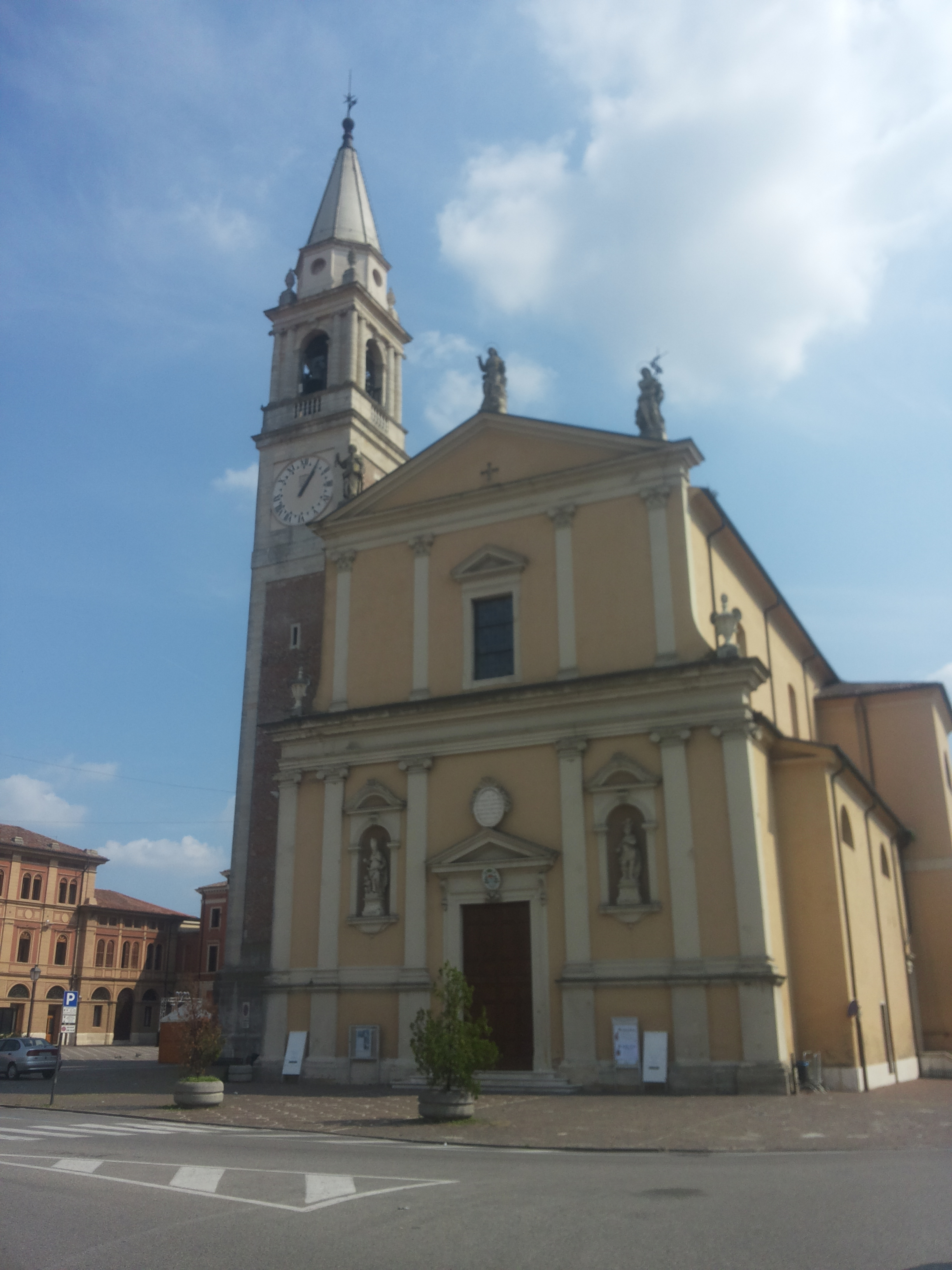 Duomo di Santa Maria Maggiore, la chiesa Parrocchiale di San Bonifacio in provincia di Verona